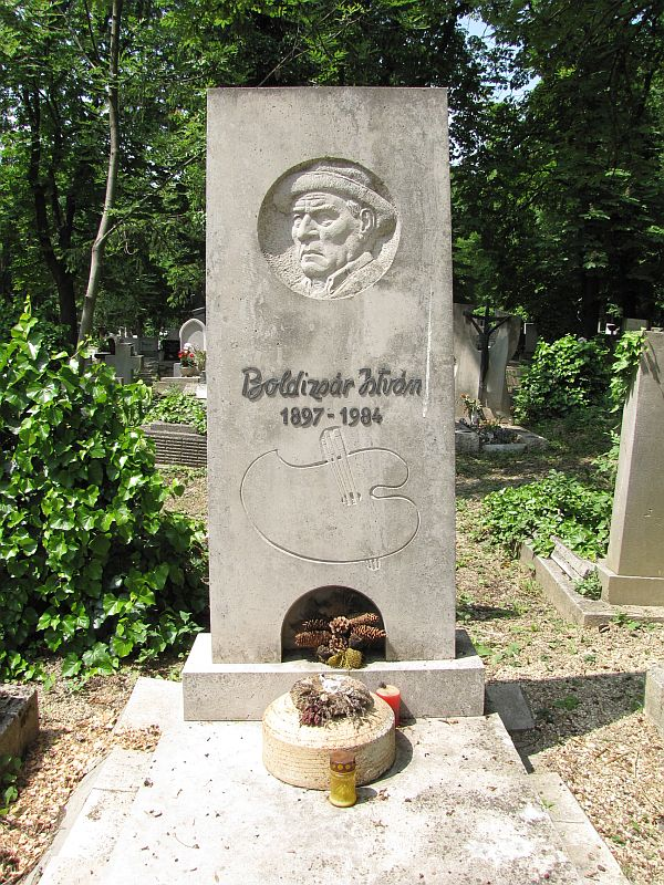 Boldizsár István (Orosháza, 1897. július 29.–Budapest, 1984. november 20.) festőművész sírja Budapesten. Farkasréti temető: 24/1-1-39